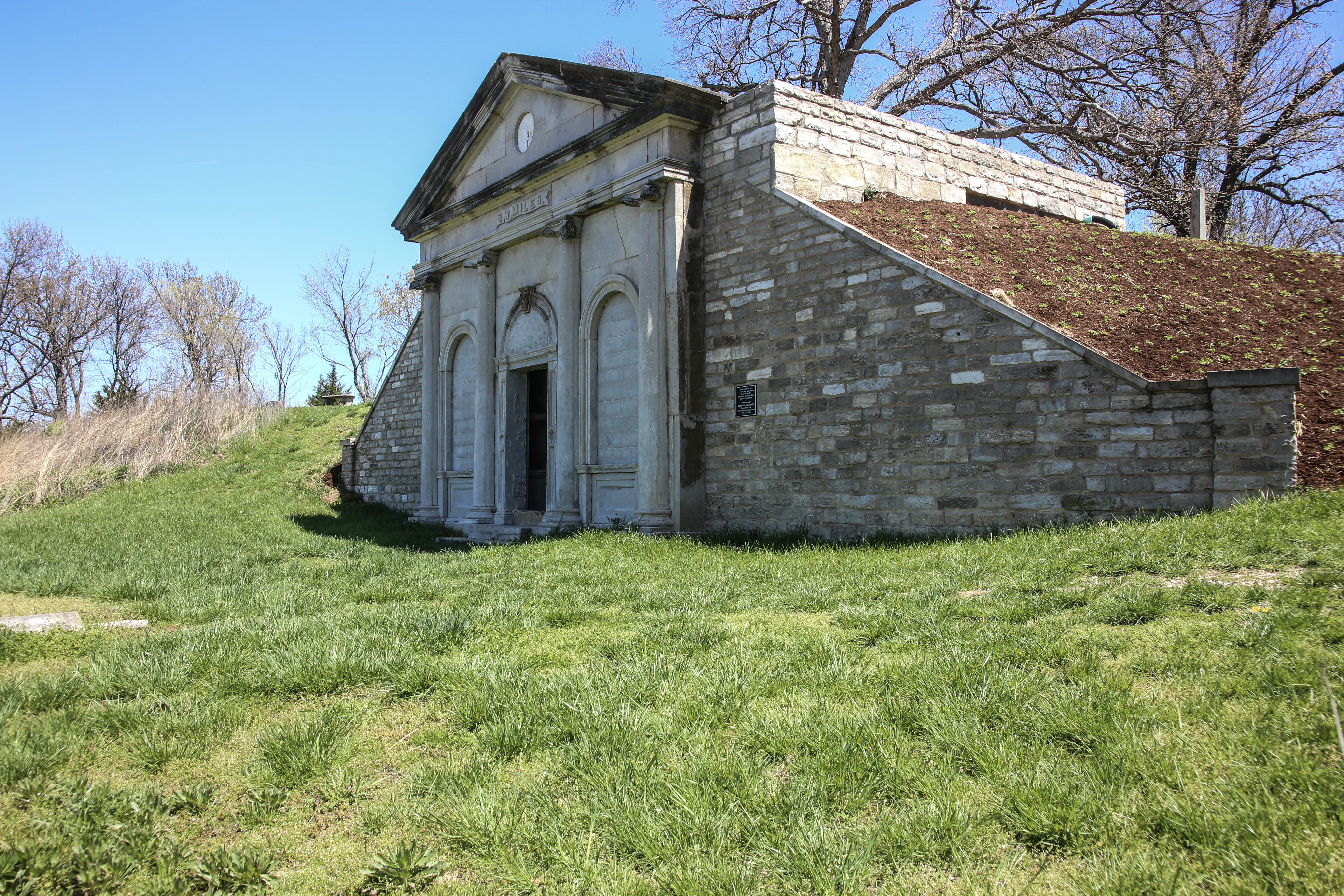 S. W. Miles. Mausoleum